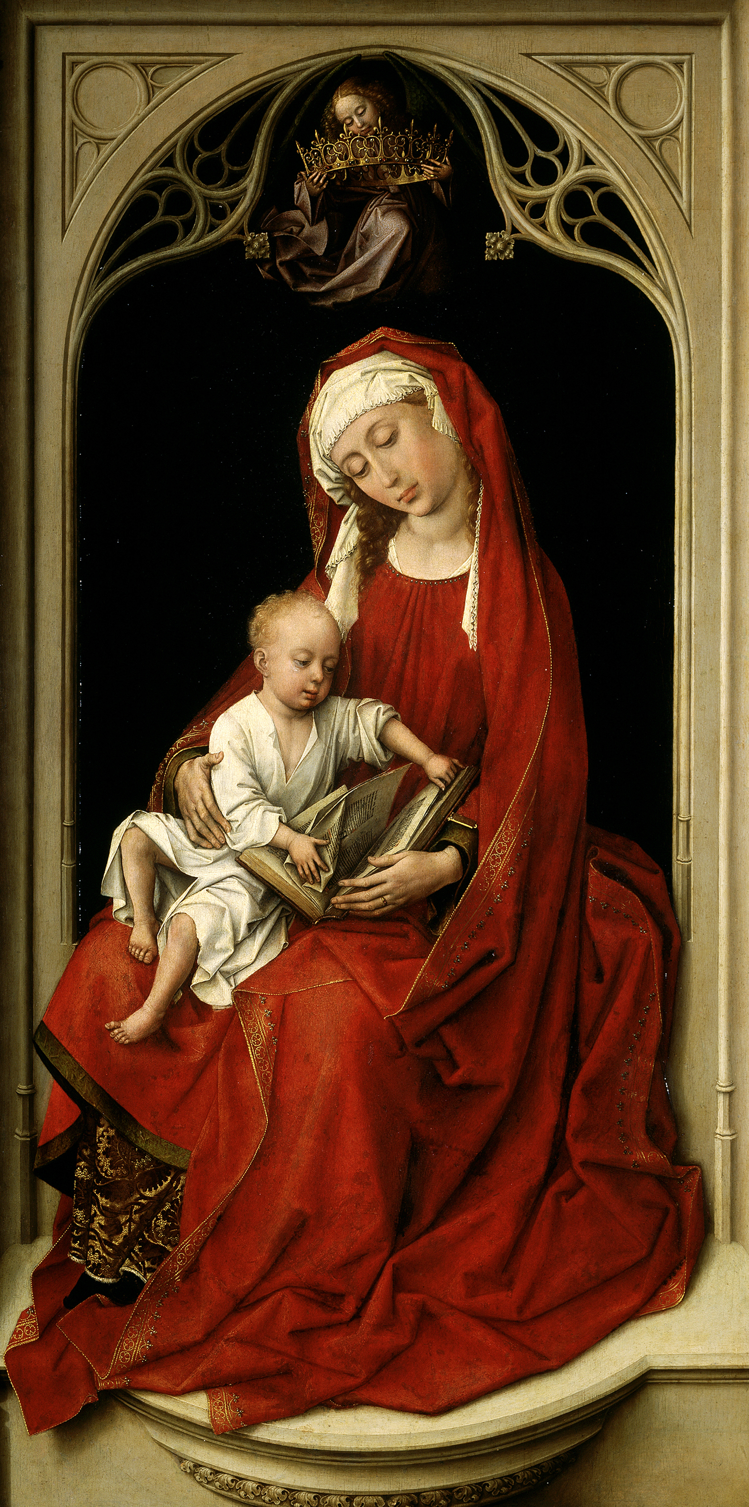 Esta obra, conocida como la Madonna Durán, representa a la Virgen María llevando sobre sus rodillas al Niño Jesús.